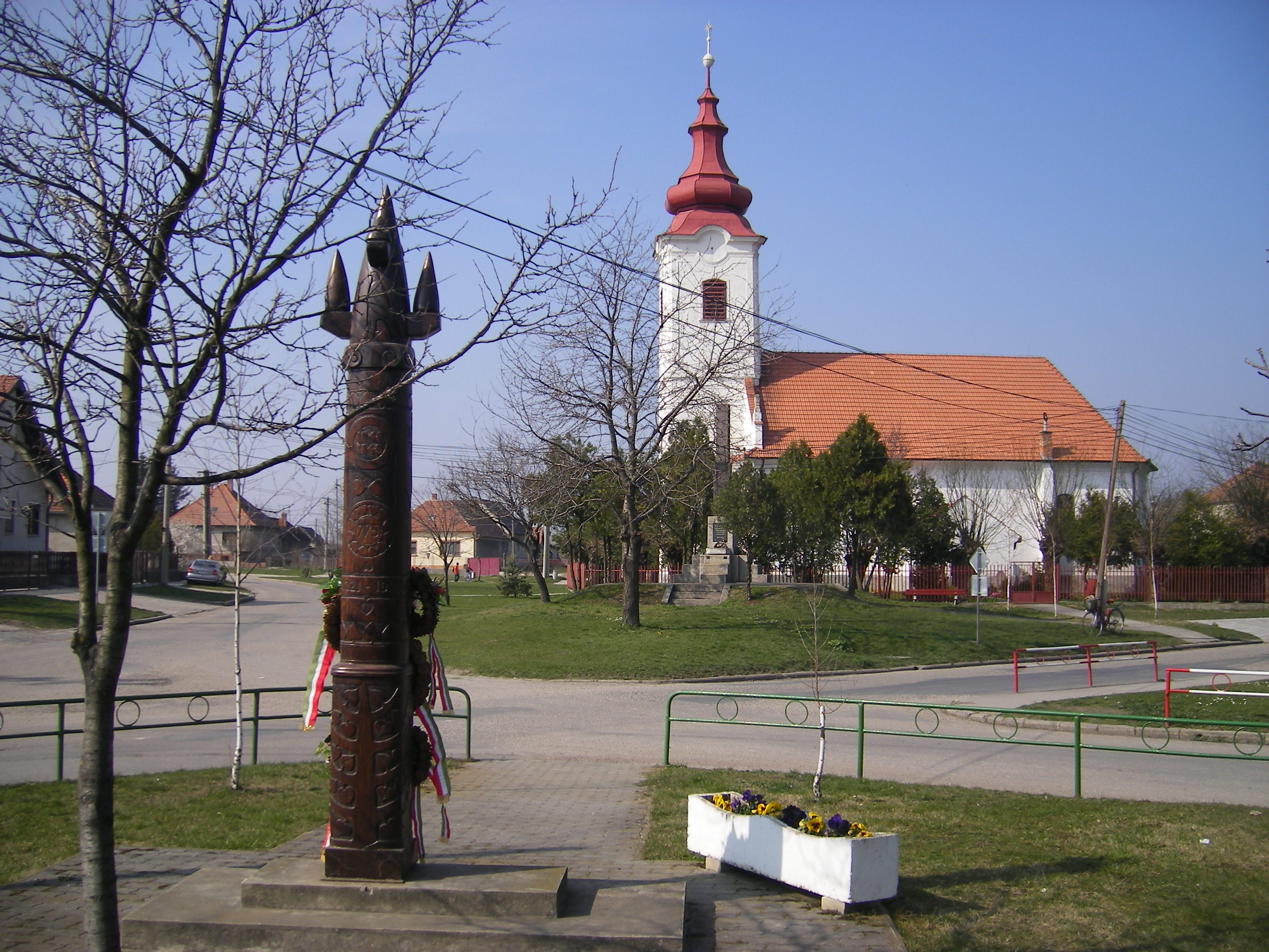 Apácaszakállas - Opatovský Sokolec